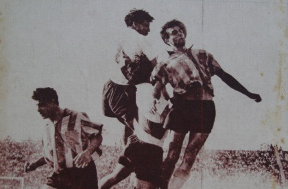 Partido del 5 de mayo de 1957, Rosario Central 1-River Plate 1. Omar Sívori (River) salta junto a Juan Carlos Biagioli (Rosario Central). Detrás de ellos aparece Héctor De Bourgoing; a la izquierda, Néstor Cardoso (Rosario Central).